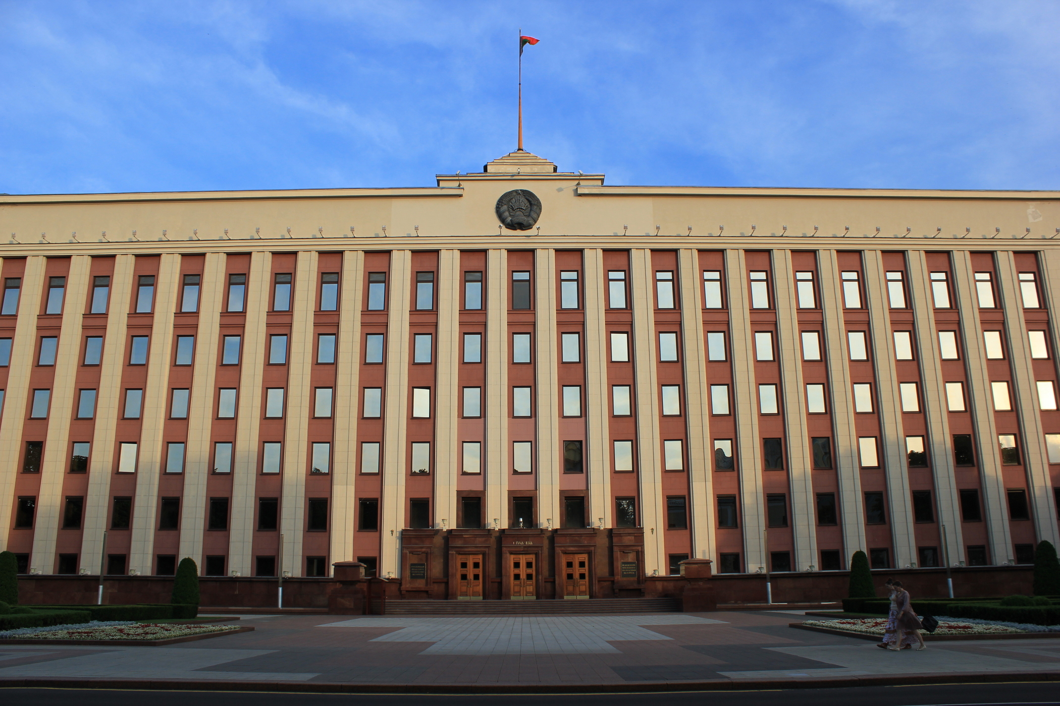 Palast der Präsidialadministration in Minsk, Belarus.